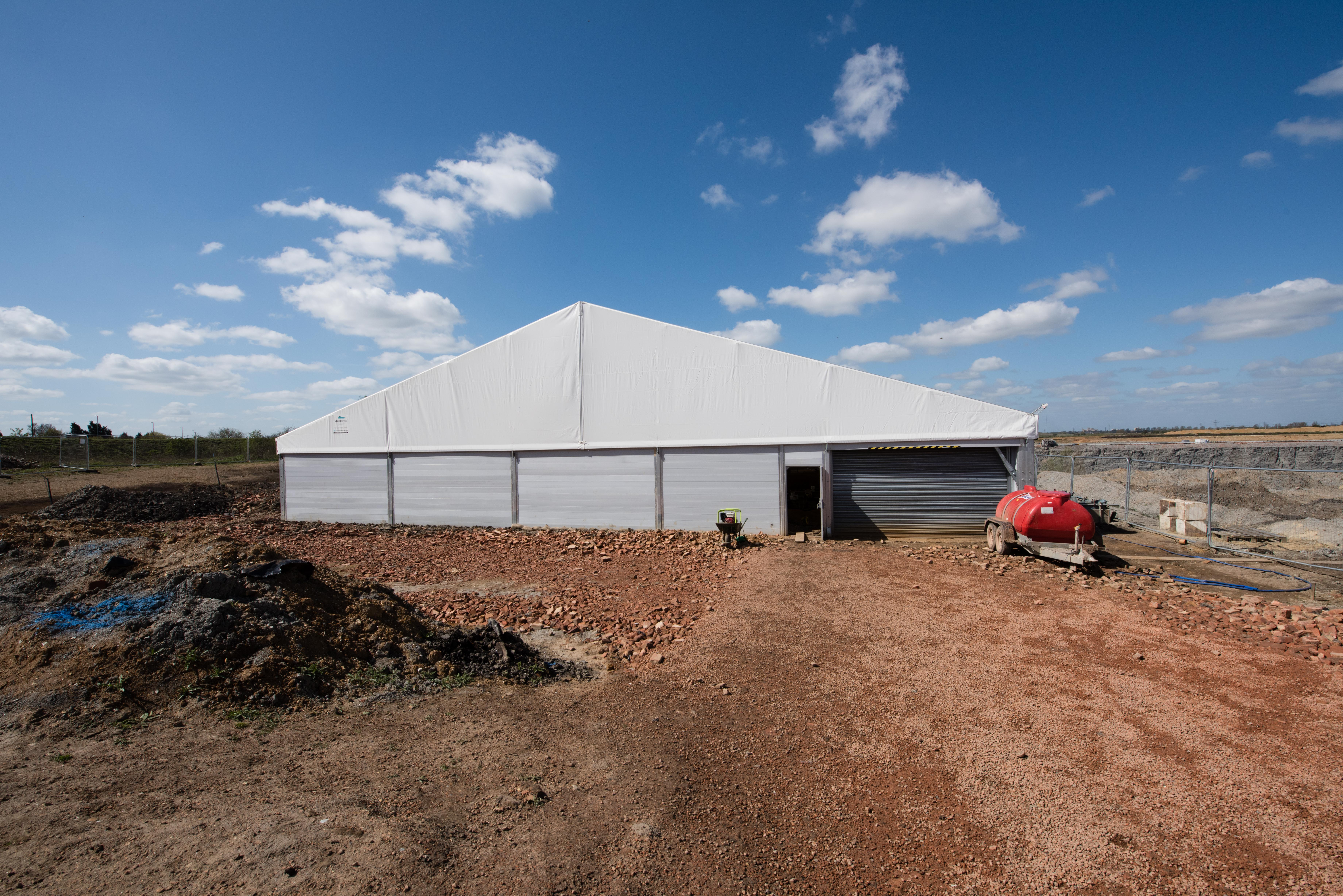 CL3_4760